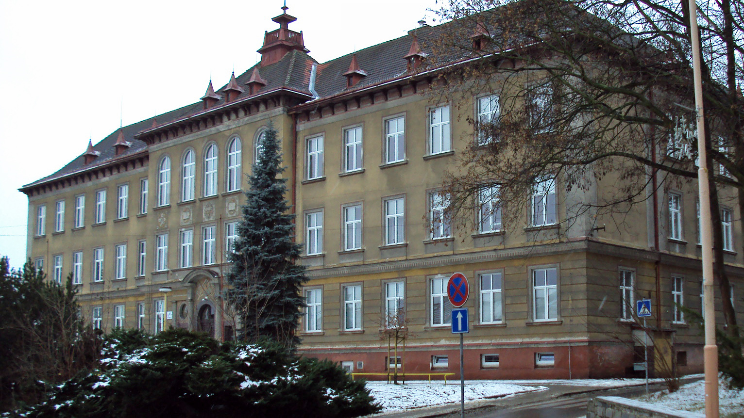 Budova Střední průmyslové školy v České Lípě